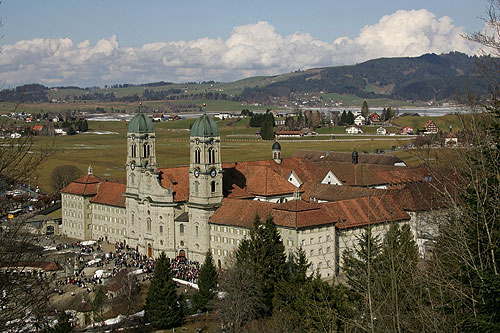 Kloster Einsiedeln mit Blick zum Sihlsee